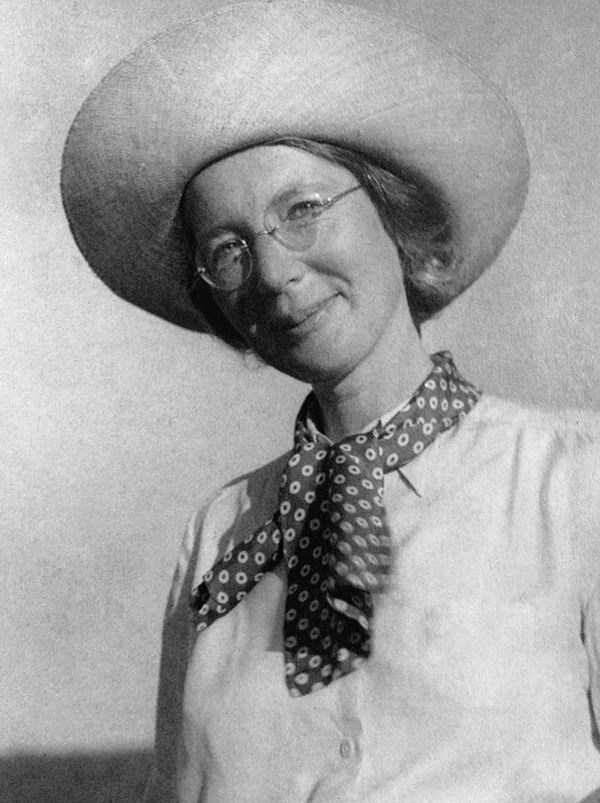 פרנציסקה ברוך, תל אביב, 1935. צילום מתוך הקטלוג ״דפוסים משתנים״, מוזיאון ישראל